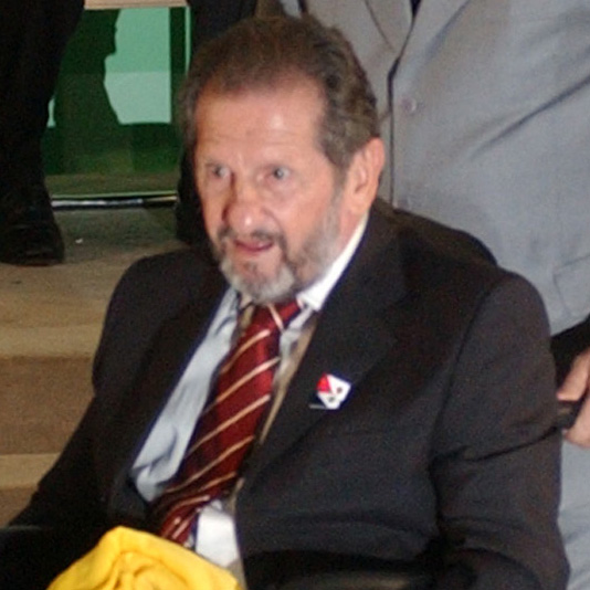 Presidente Lula e o ex-jogador de futebol Newton De Sordi durante comemorações aos 50 anos do primeiro título da Copa do Mundo conquistado pelo Brasil em 1958, no Palácio do Planalto